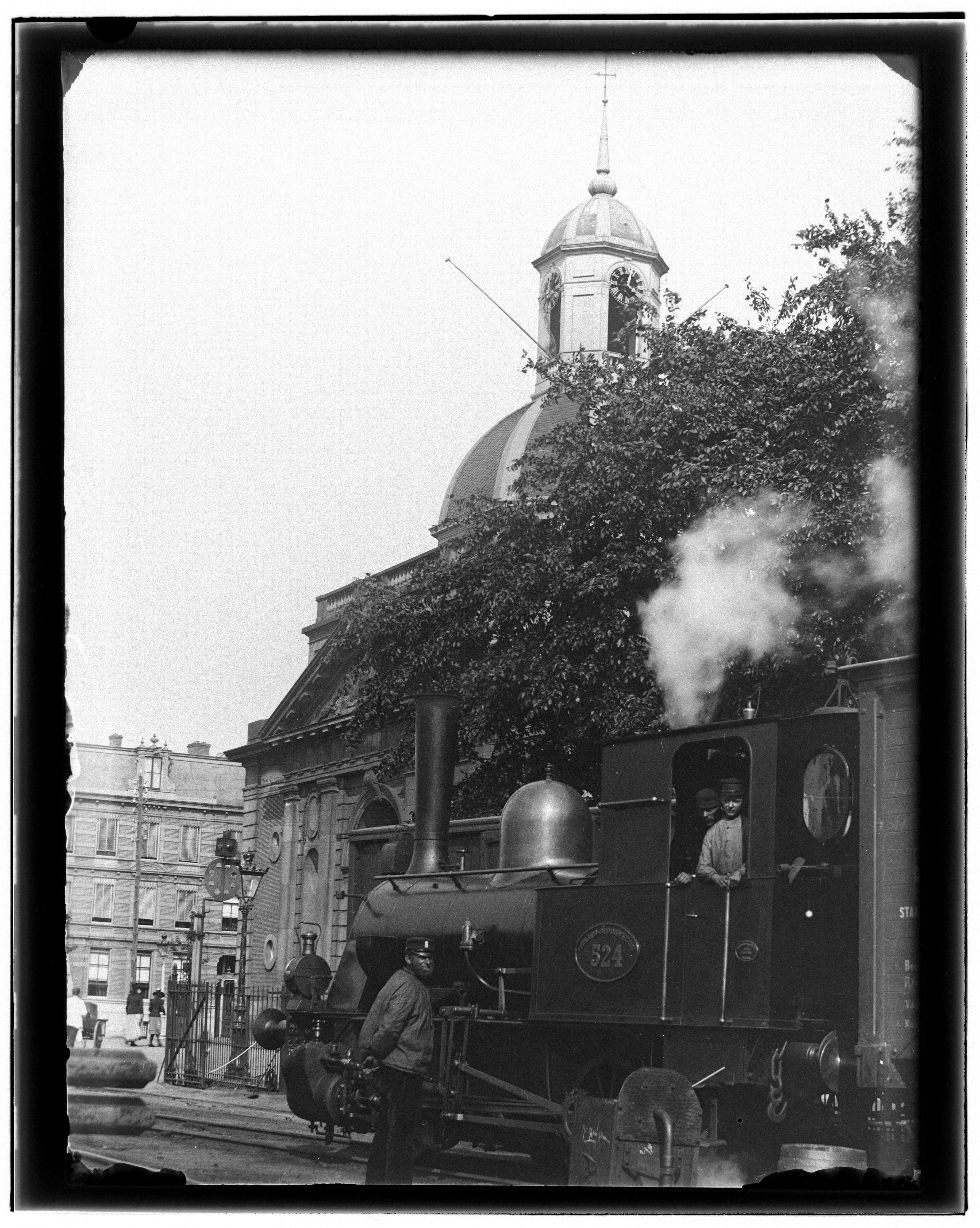 Beschrijving Sarphatistraat Links een gedeelte van Alexanderplein en Muiderpoort. Los- en laadplaats``, met locomotief 524 van de Staats Spoorwegen. Documenttype foto Vervaardiger Olie``, Jacob (1834-1905) Collectie Collectie Jacob Olie Jbz. Datering 1890 Geografische naam Sarphatistraat Inventarissen Afbeeldingsbestand 10019A000444 Generated with Dememorixer